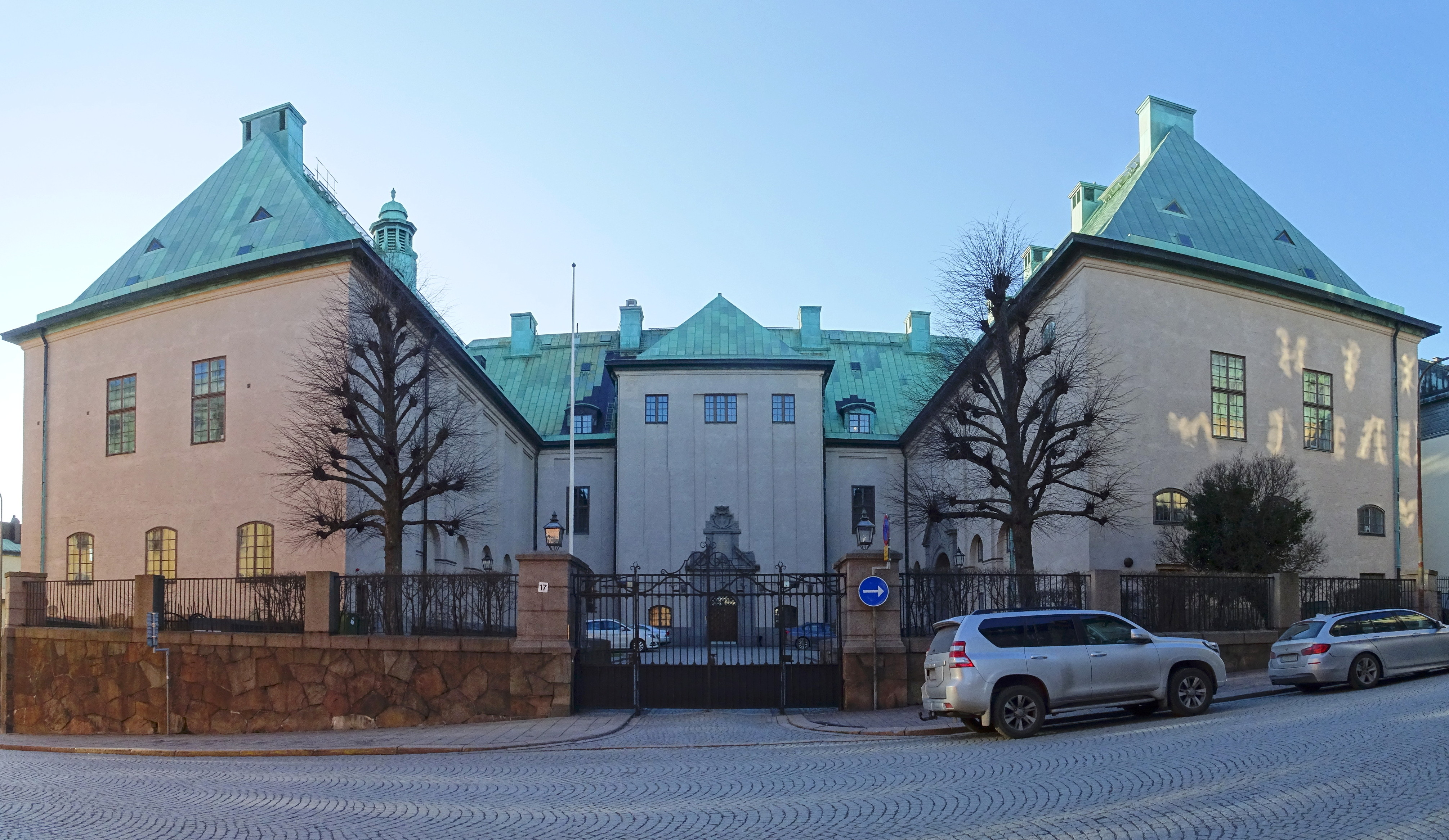 Timmermansordens hus, Stockholm, fasad mot öster